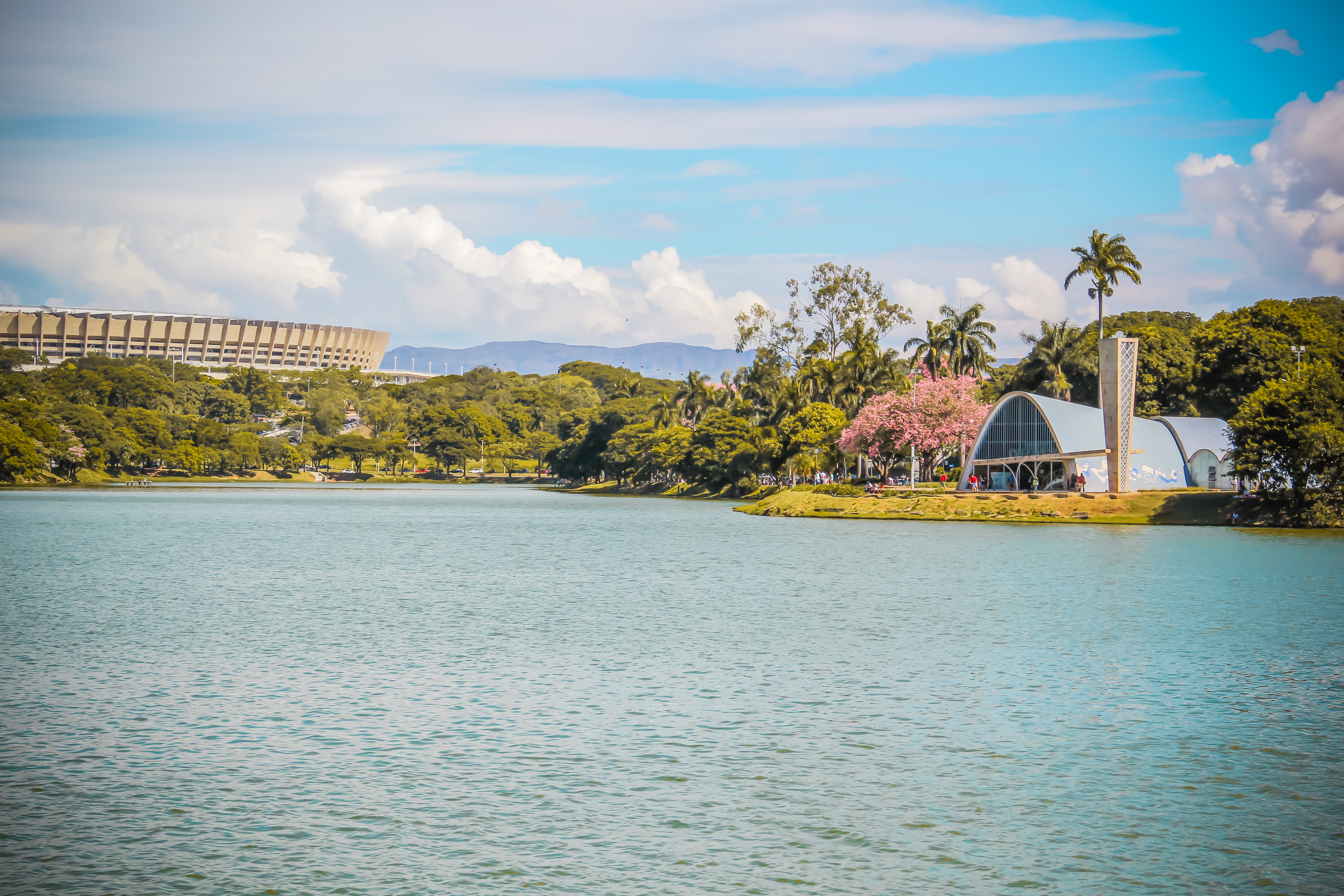 Pampulha: conjunto arquitetônico e paisagístico